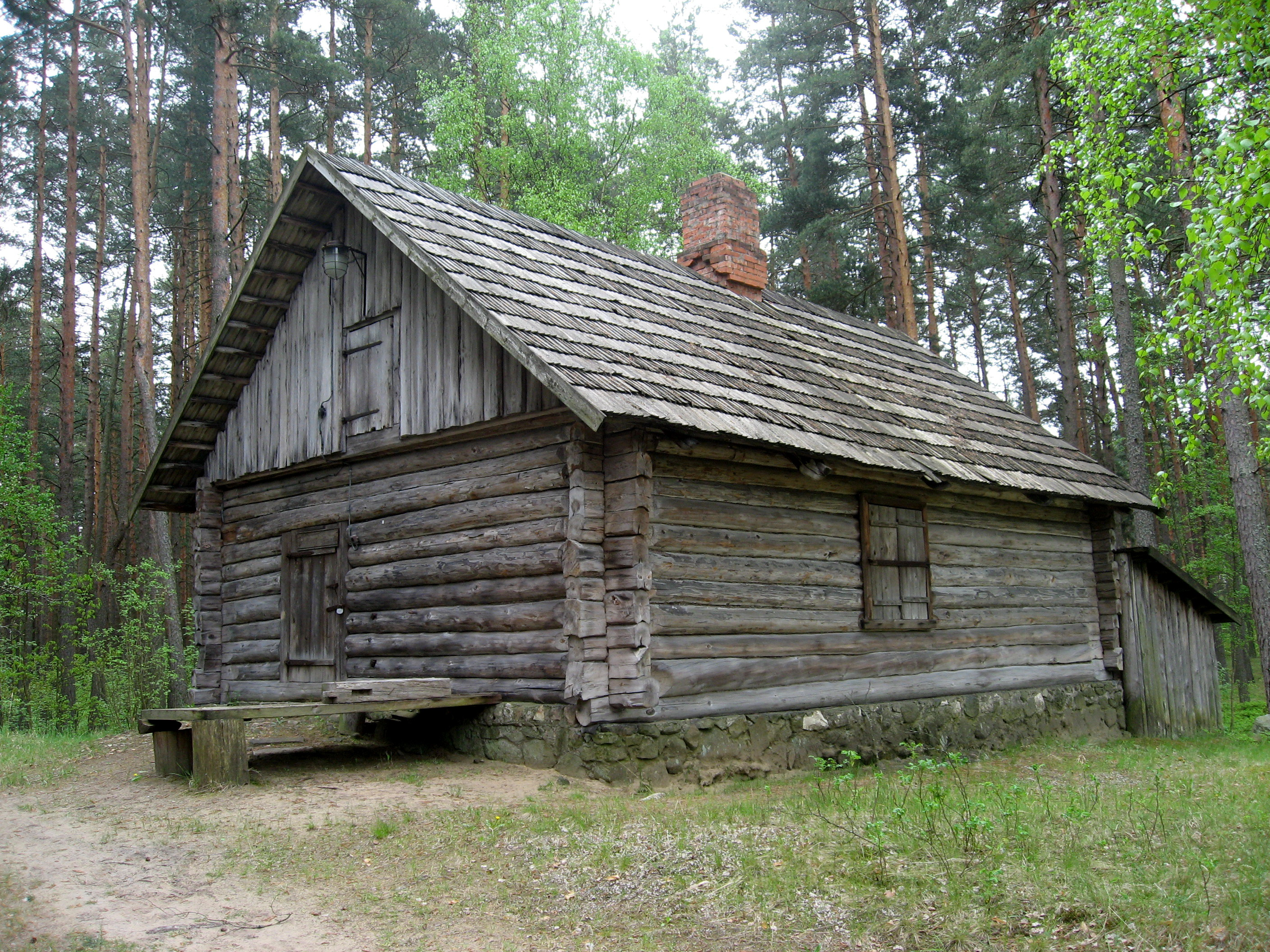 Lotyšské etnografické muzeum v přírodě: Hrnčířská dílna s pecí, oblast Vidzeme, Lejasciems, "Čipati", postavena okolo roku 1870